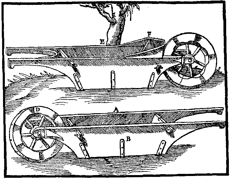 Description : brouette avec la caisse suspendue aux brancards Source : Georgii Agricolae : De Re Metallica (1556) copiée sur Statut : ouvrage ancien dans le domaine public